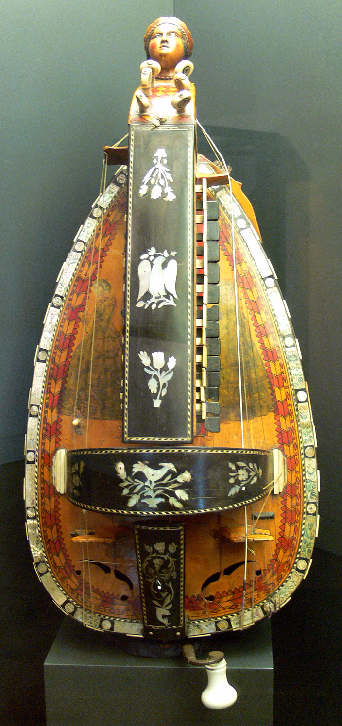 Drehleier, Frankreich 1859, Ahorn/Ebenholz/Elfenbein/Perlmutt/Palisander signiert Pajot facteur d'instruments à Jenzat par Gannat (Allier) 1859 Nr. 3039 (Pajot Père), repariert 1911 Gallery: Musikinstrumentenabteilung; Museum Zeughaus; Reiss-Engelhorn-Museen, Mannheim